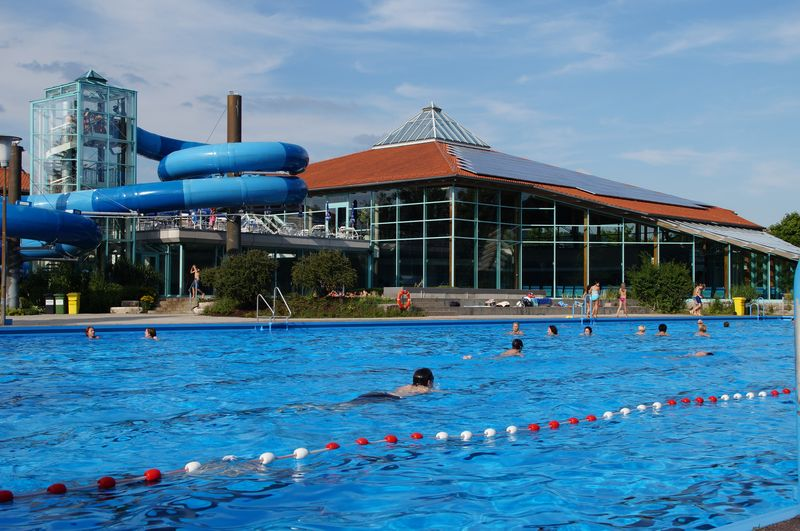 Auf dem Bild sieht man das 50m lange Außensportbecken mit Blick auf die Schwimmhalle und Rutsche